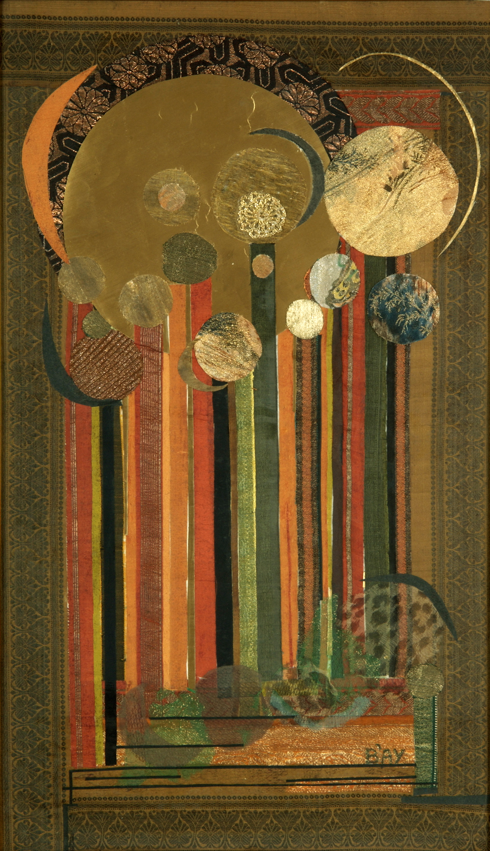 Bednay Éva: Varázslatos erdő; selyem kollázs